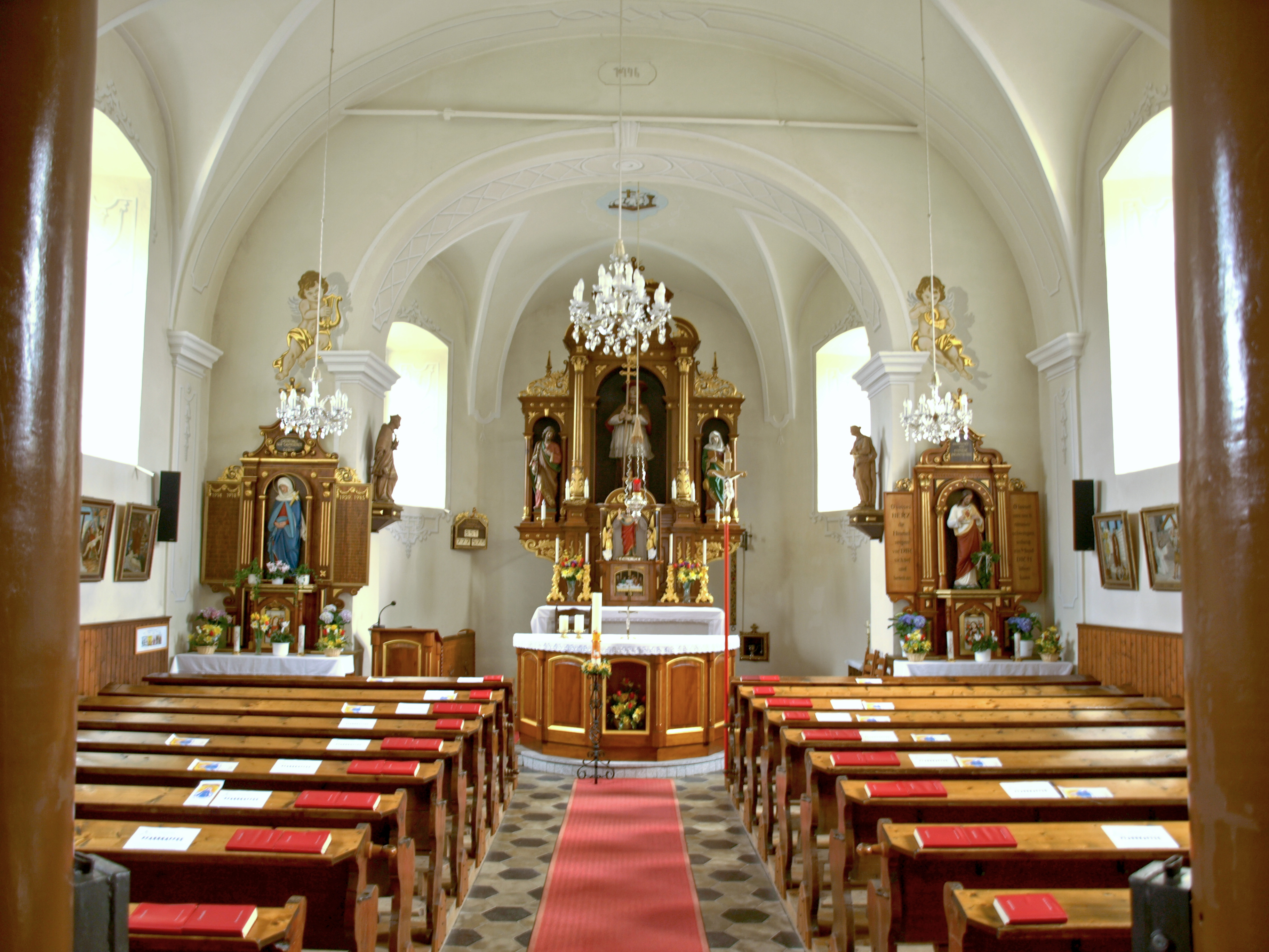 Kath. Pfarrkirche hl. Karl Borromäus